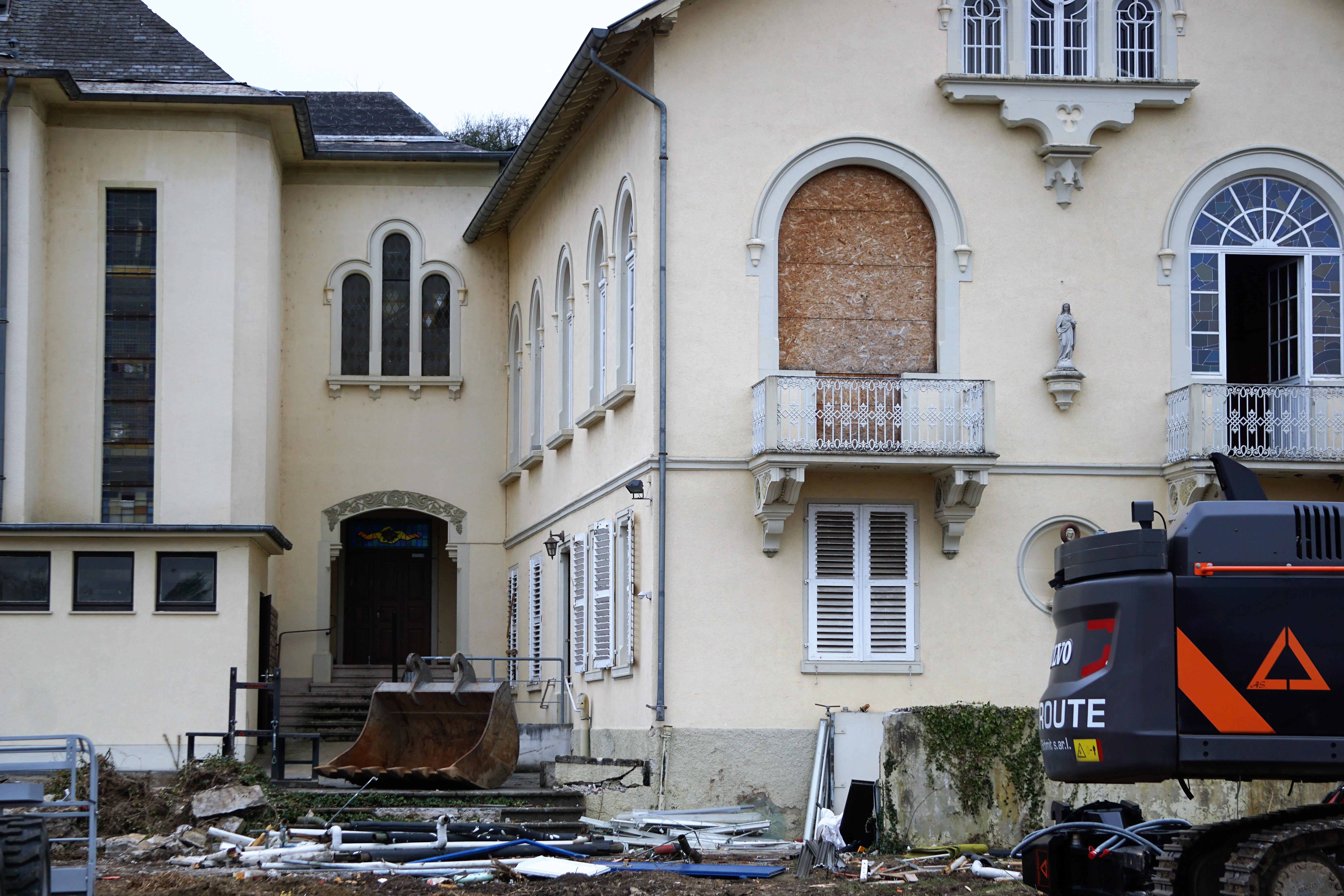 Remich, ancien home "Réimecher Kannerheem" en démolition (côté sud).